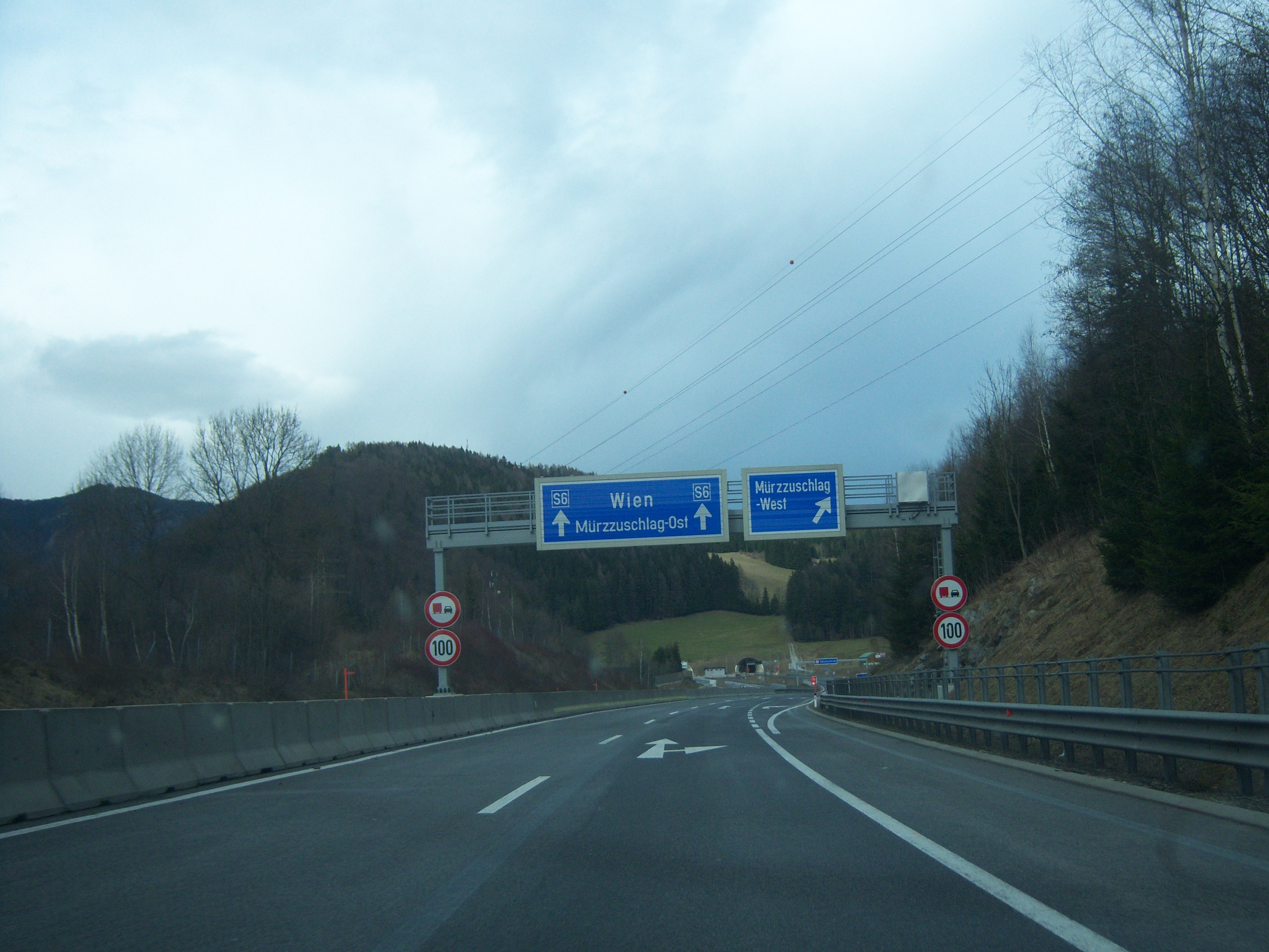 Semmering Schnellstraße S6 im Bereich der Anschlussstelle Mürzzuschlag-West